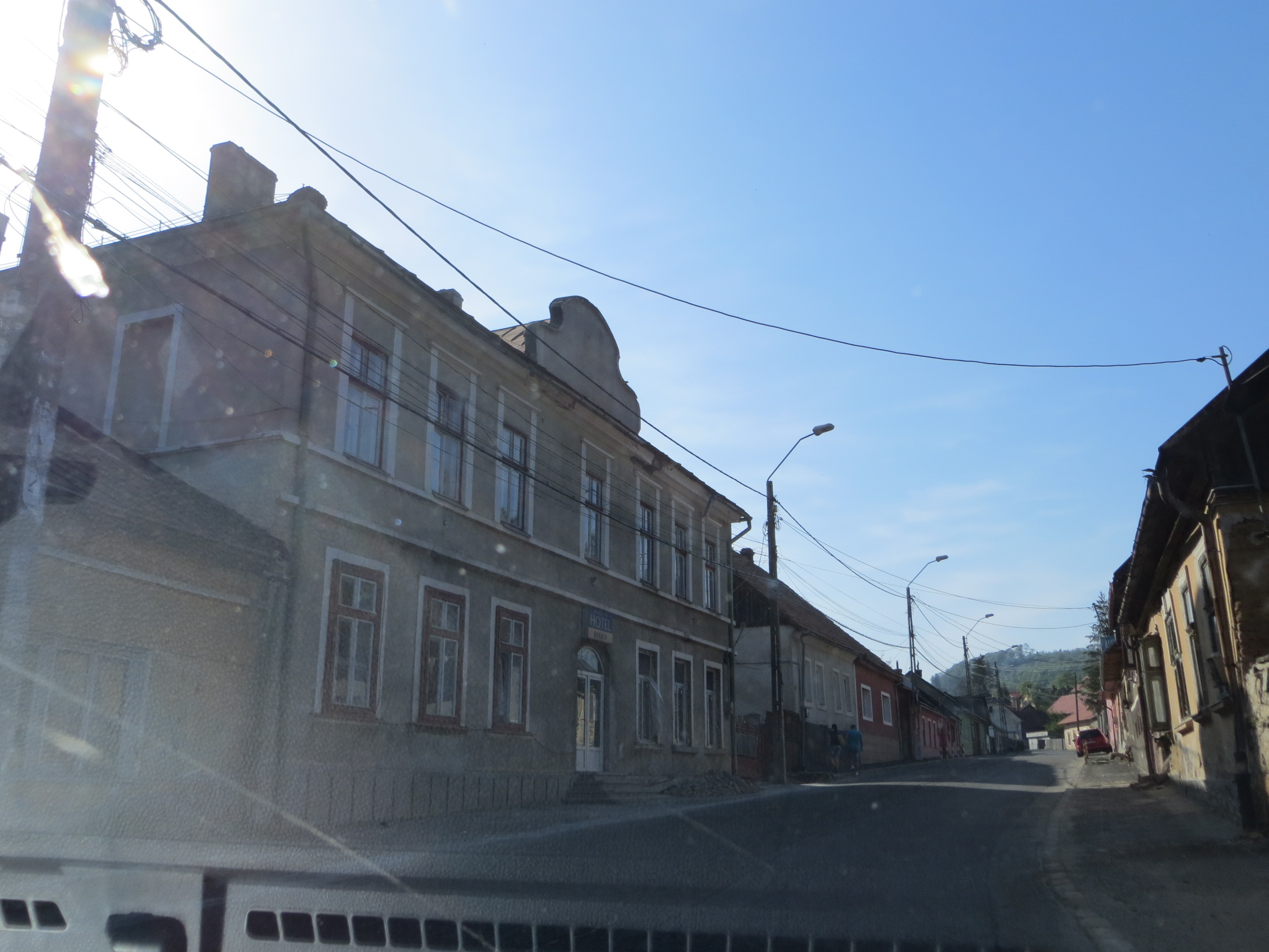 Casa Oficiului, azi hotel